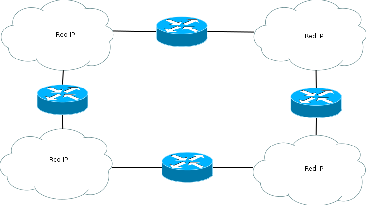 Varias redes conectadas por routers.